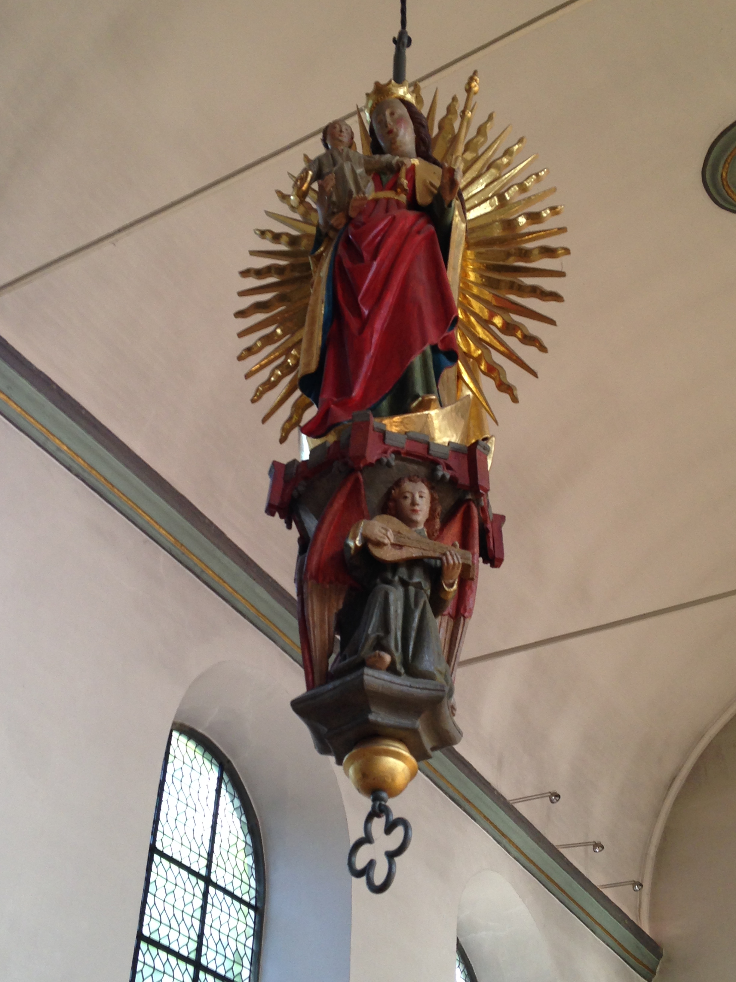 Strahlenmadonna im Innenraum von St. Johannes, Johanniterstraße Ecke Kapuzinerstraße, 46325 Borken This is a photograph of an architectural monument. 19